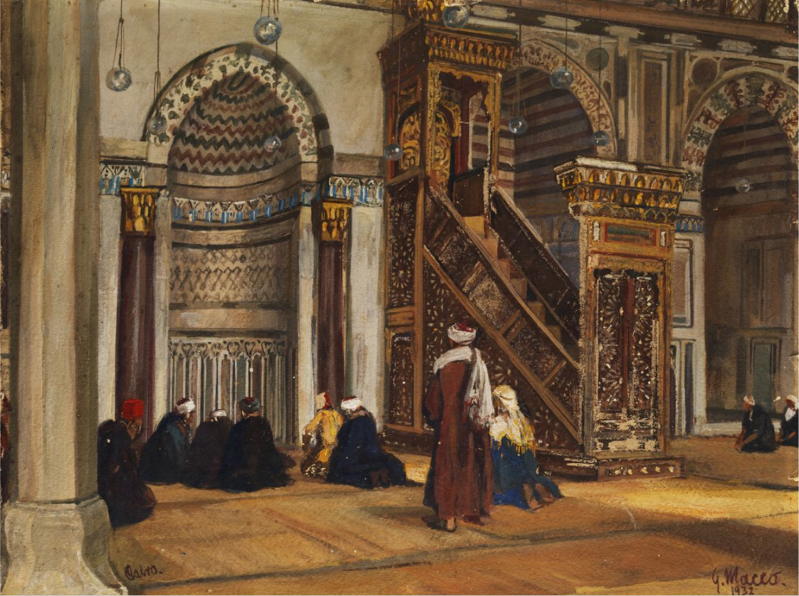 Georg Macco: Die al-Burdayni-Moschee in Kairo, Gouache/Tempera auf Karton, 38,5 x 51,5 cm, datiert 1932